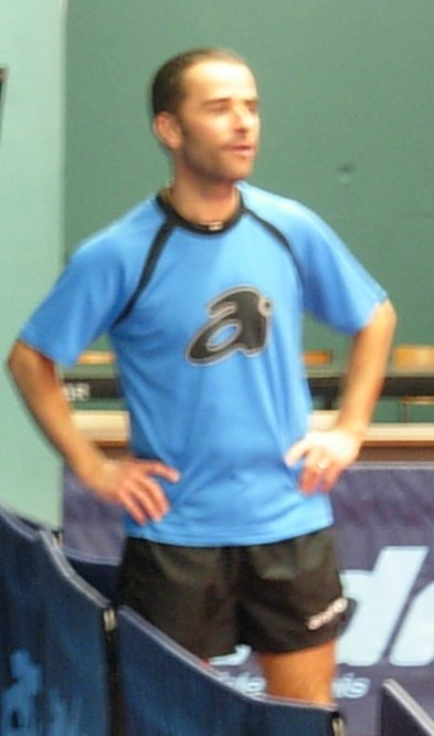 Le pongiste Damien Eloi lors d'un entrainenement le 11 mars 2012